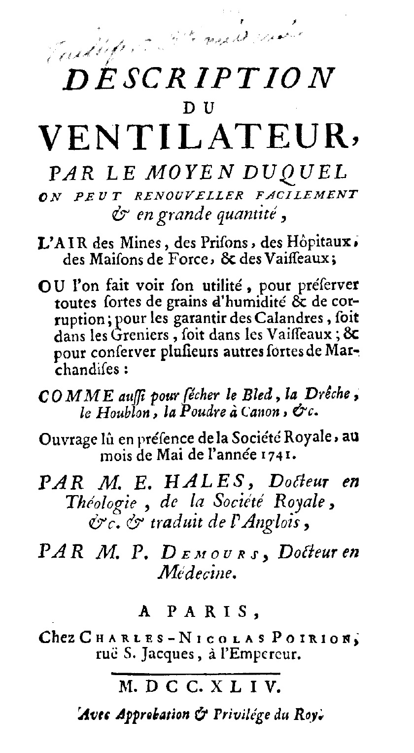 Description du ventilateur, par le moyen duquel on peut renouveller facilement & en grande quantité, l'air des mines, des prisons, des hopitaux, ... ou l'on fait voir son utilité, pour préserver toutes sortes de grains d'humidité & de corruption; ... Ouvrage lu en présence de la Société Royale, au mois de mai de l'année 1741. Par m.e. Hales, ... & traduit de l'anglois, par m.p. Demours, .... - A Paris : chez Charles-Nicolas Poirion, ruë S. Jacques, à l'Empereur, 1744. - LII, 277, [3] p., [2] c. di tav. ill. ripieg. ; 12º . Frontespizio